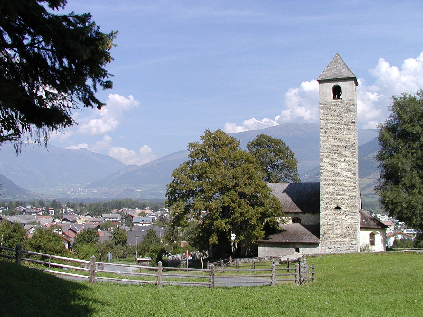 Kirche St. Johann in Prad am Stilfser Joch, Blick von Süden